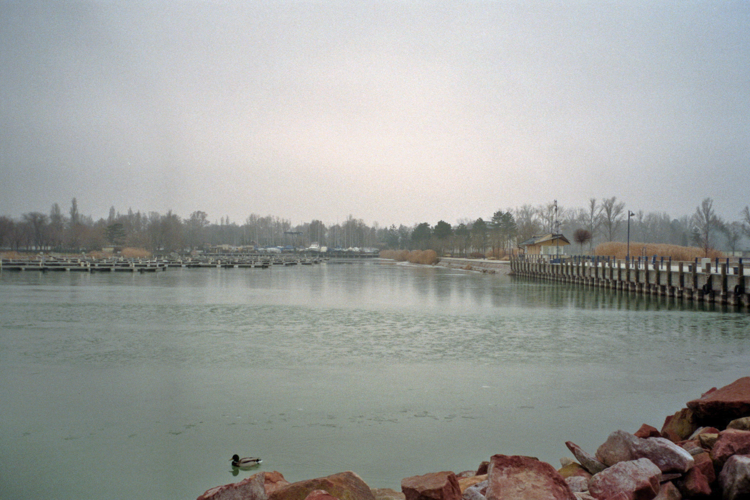 Balatonszemes, Hafen, Ungarn - Silvesternachmittag 2012